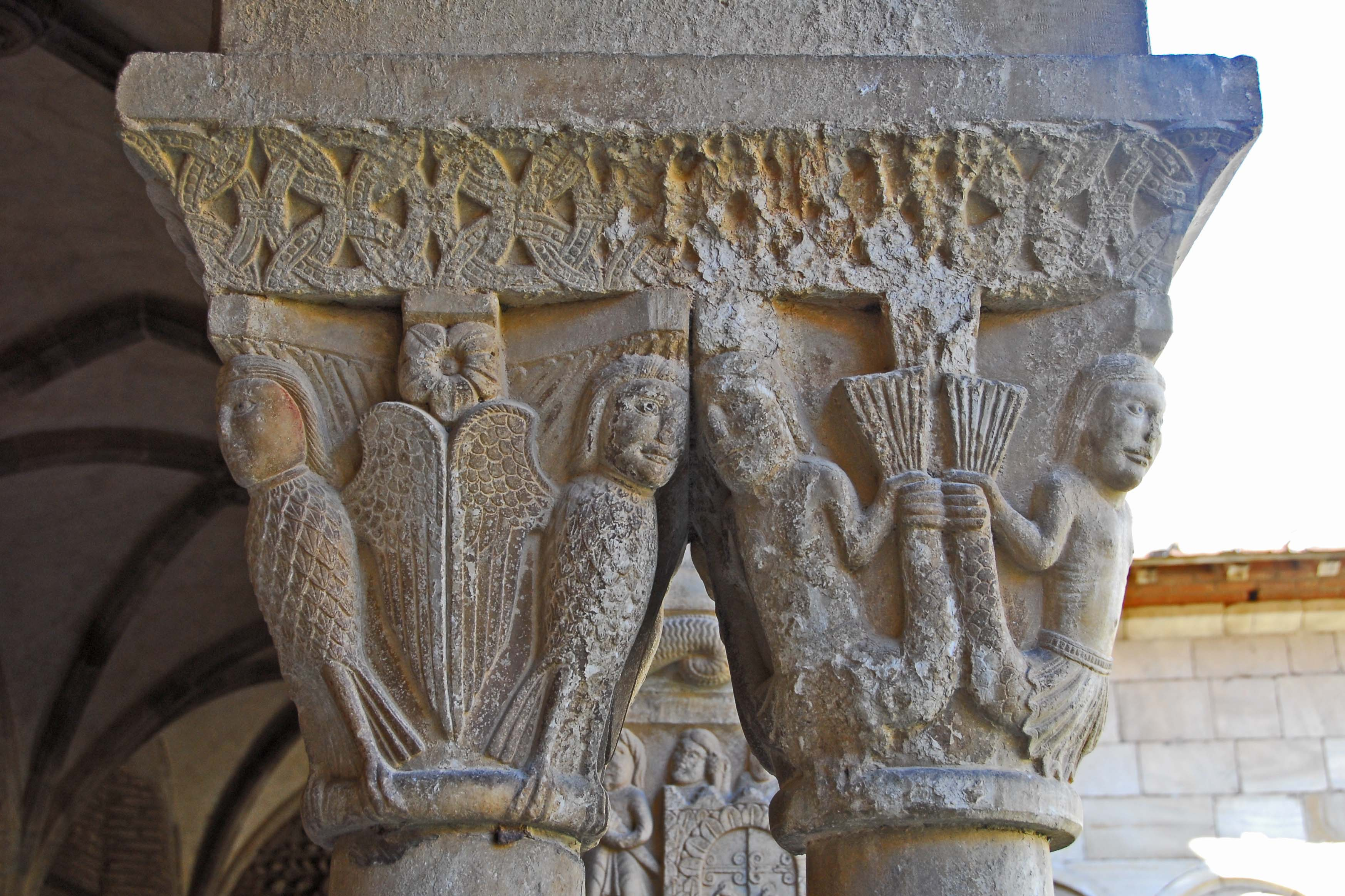 Ste-Eulalie-et-Ste-Julie_d’Elne, Säulenkapitelle Südgalerie, Adler und Sirene